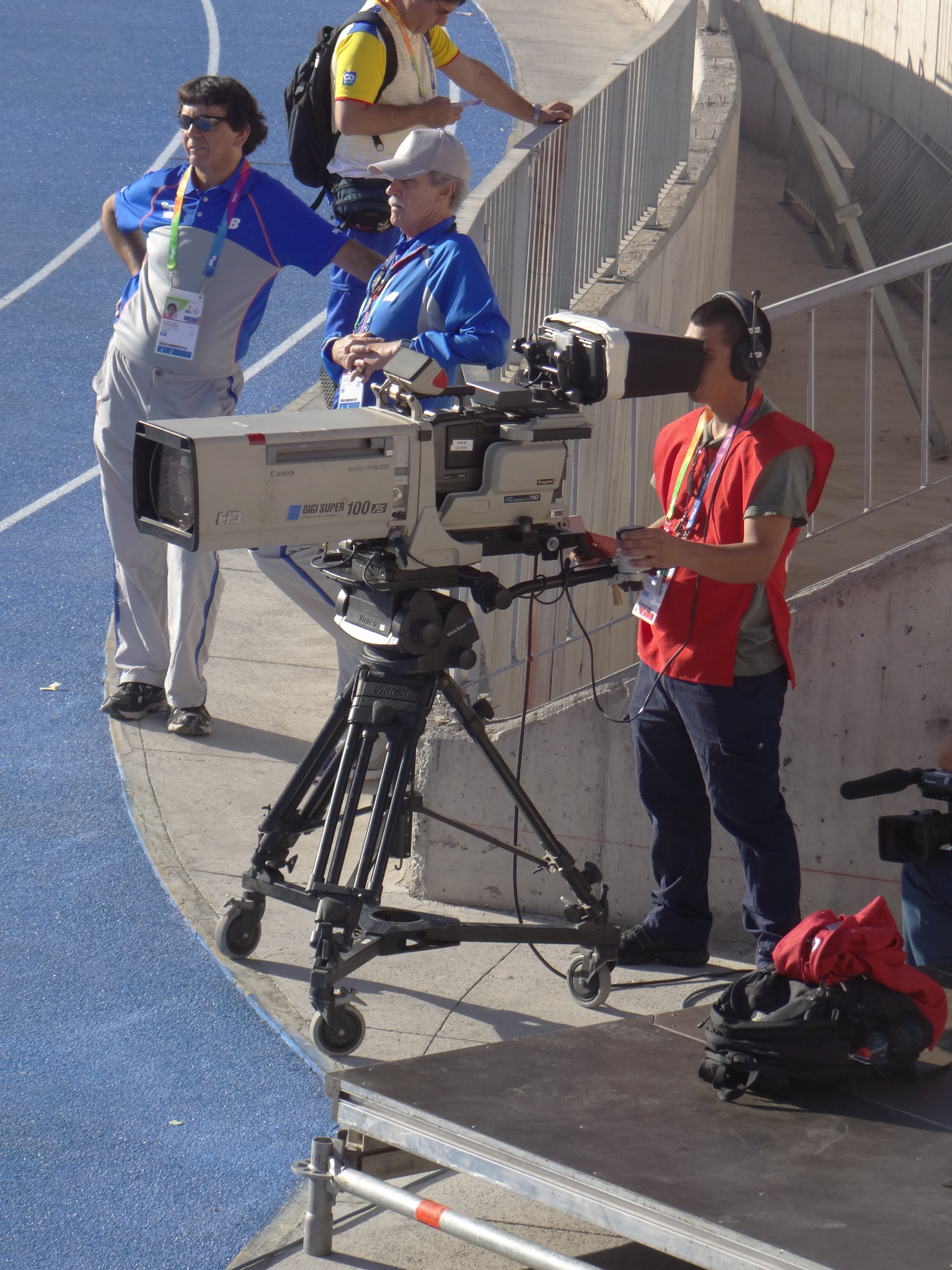 X Juegos Suramericanos Santiago 2014 Estadio Nacional Cámara de televisión de Chilefilms Jornada 13.03.2014